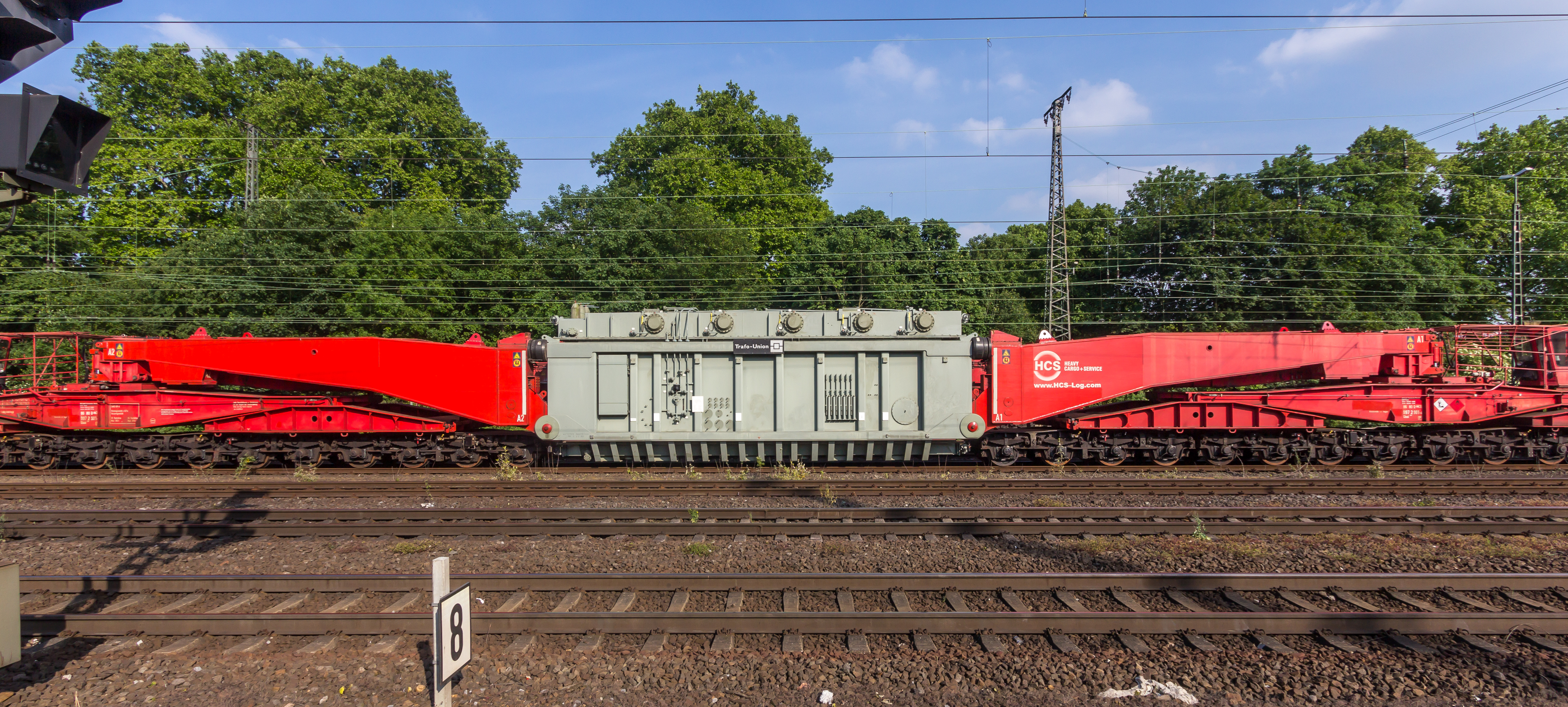 Tragschnabelwagen Uaai 839 der HCS Heavy Cargo + Service mit eingehängtem Trafo der Trafo-Union im Bahnhof Köln-West